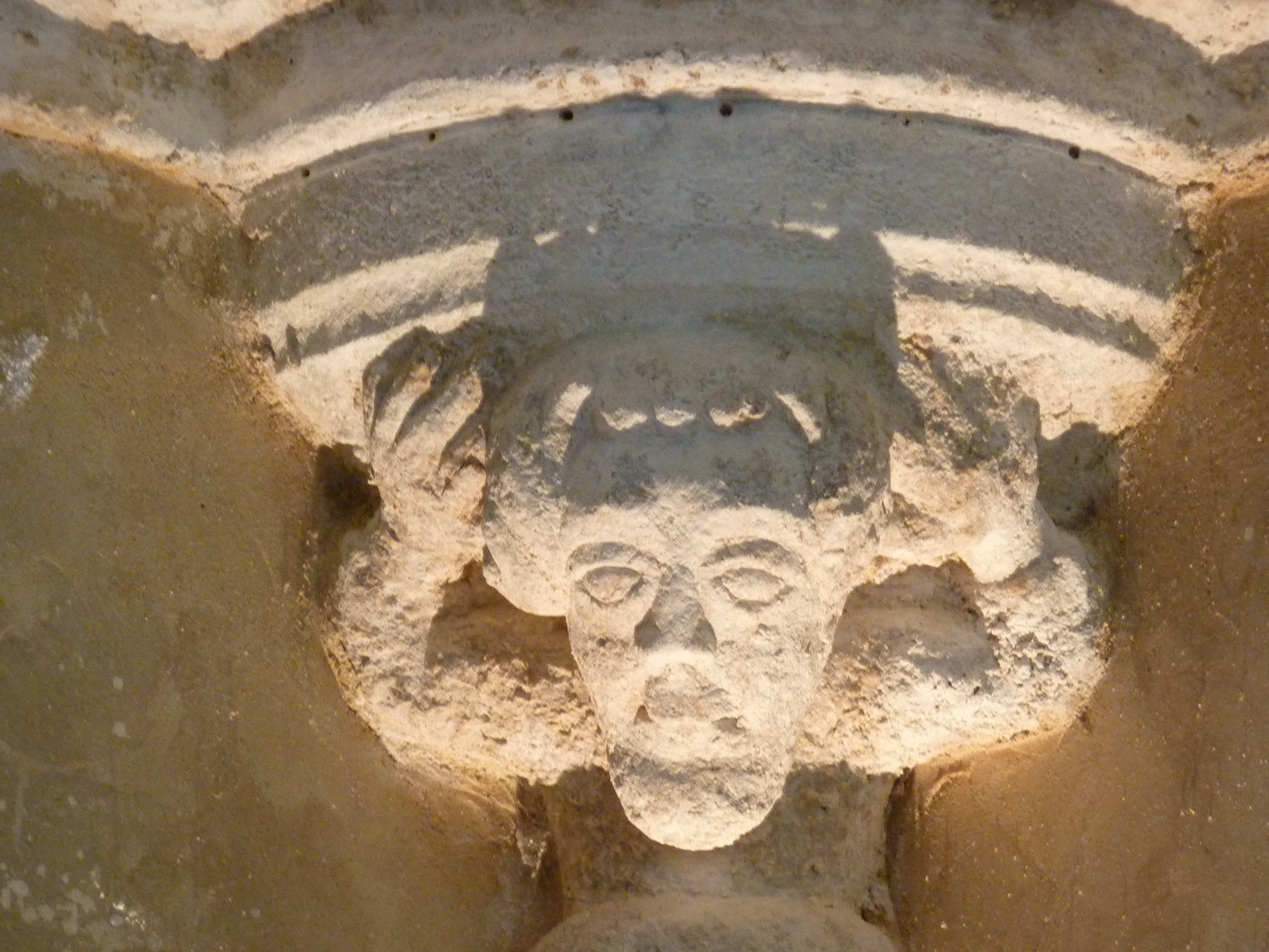 Abbaye Saint-Maurice de Carnoët Détail d'un chapiteau salle capitulaire XIIIème siècle